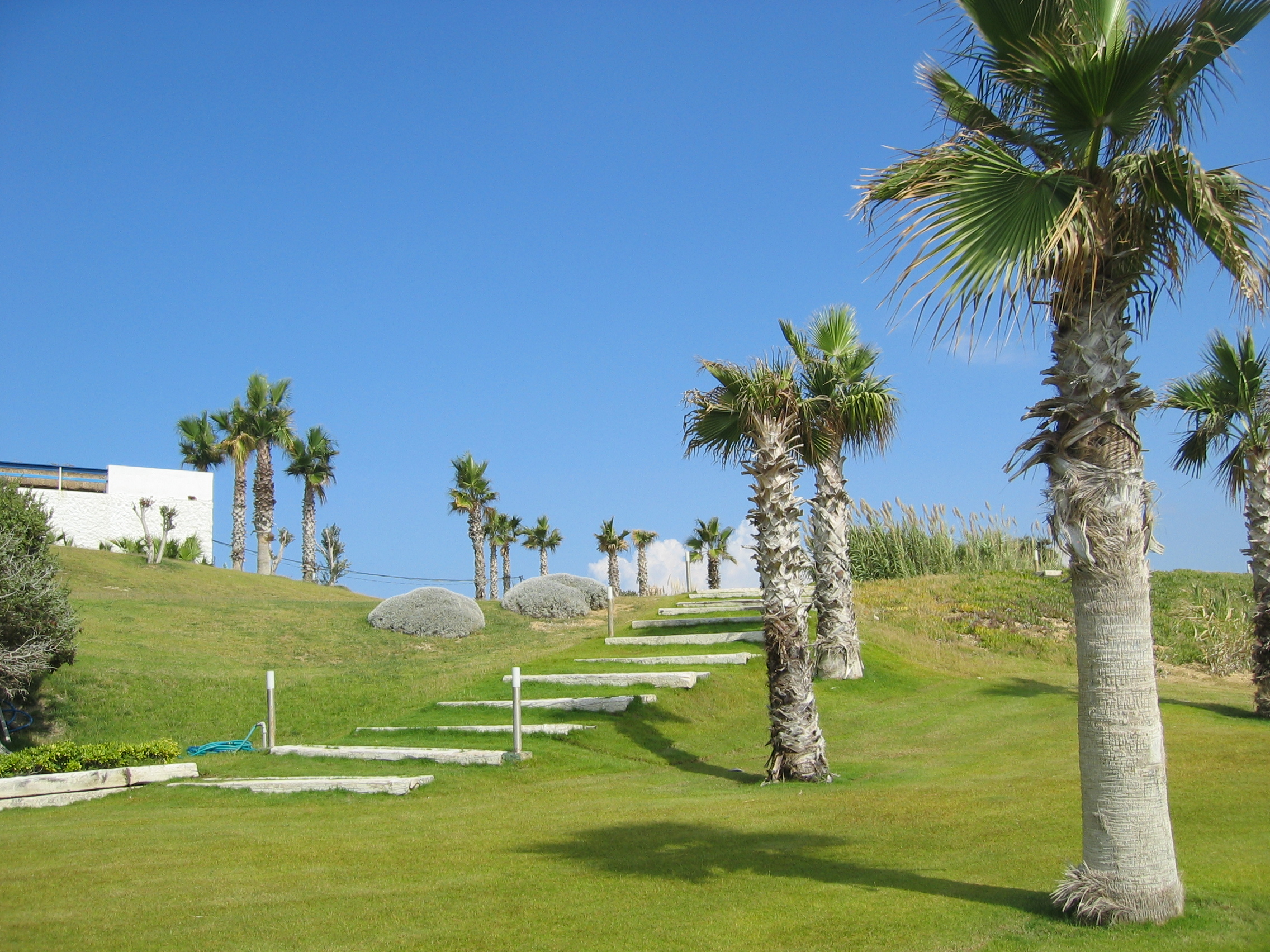 Altinkum Beaches 06 (October2009)